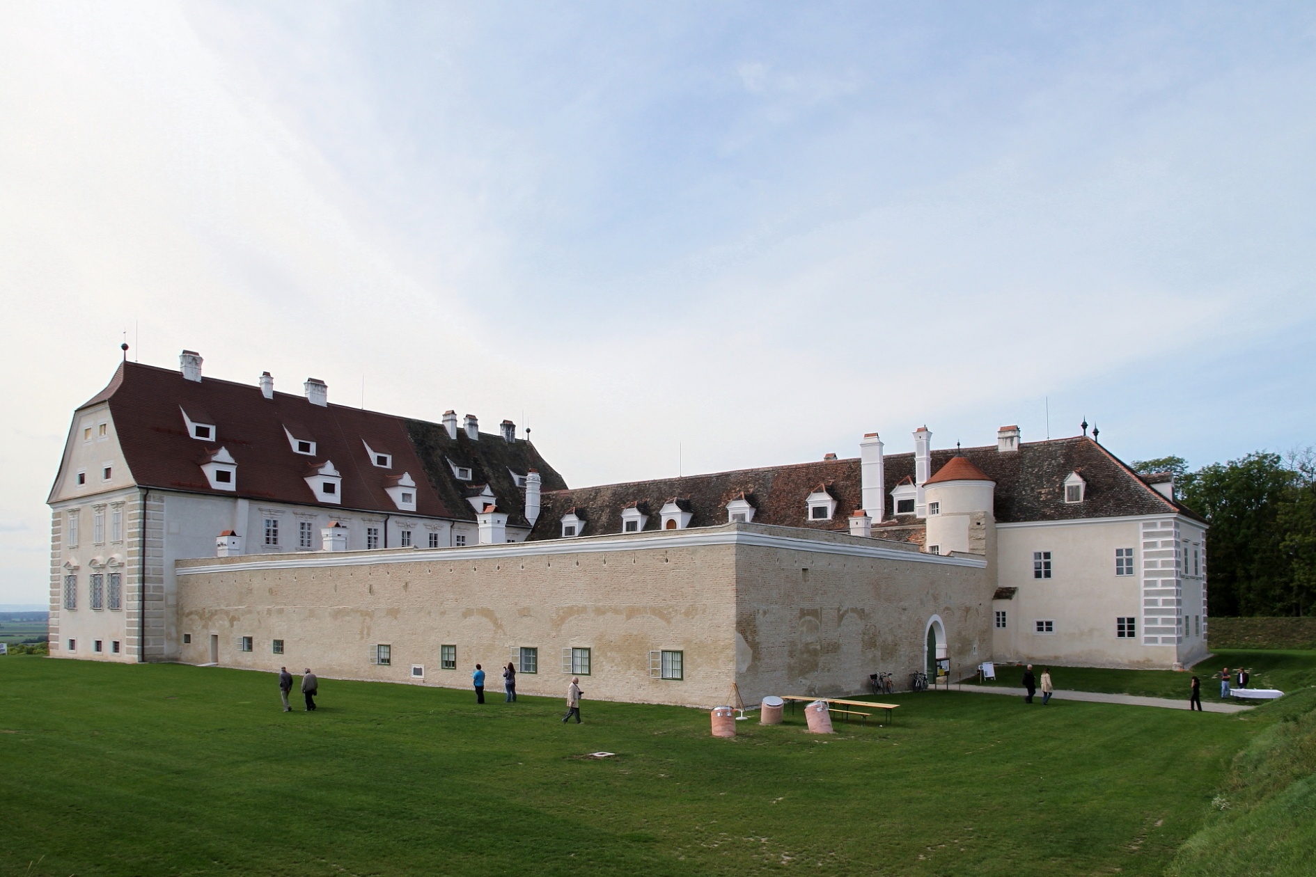 Nordostansicht des Schlosses Juliusburg, auch als Schloss Stetteldorf bezeichnet, in der niederösterreichischen Marktgemeinde Stetteldorf am Wagram.